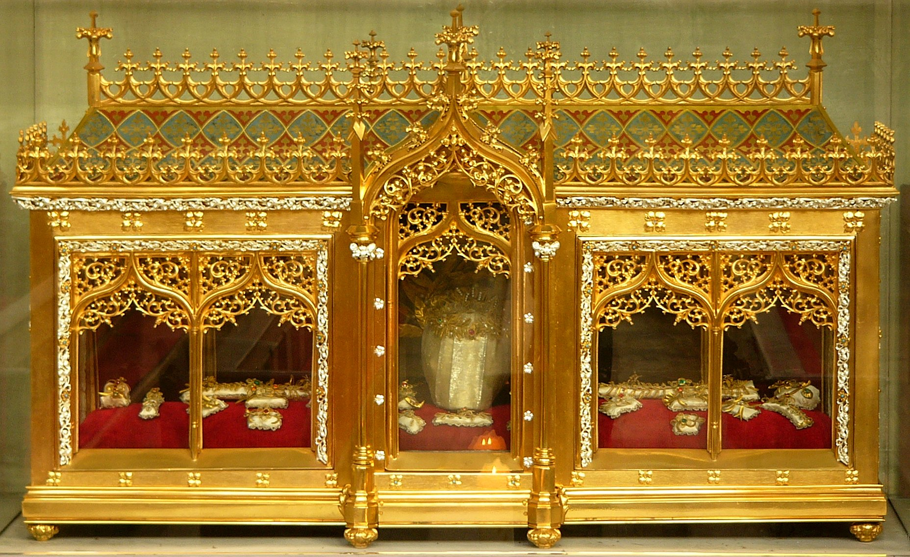 Das Reliquiar mit den Gebeinen des Hl. Kastulus.